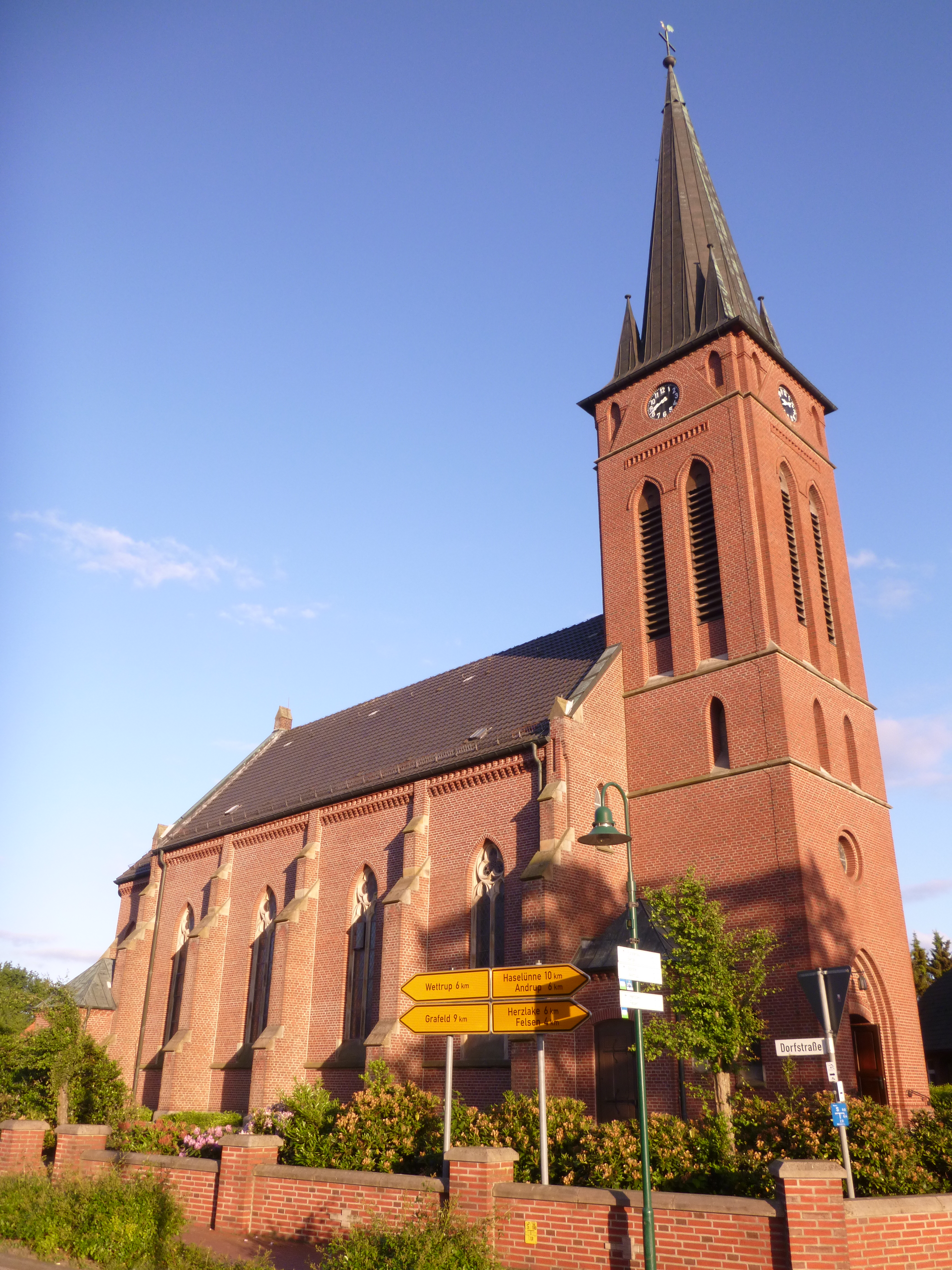 katolika kirko en Dohren, distrikto Emsland, Germanio